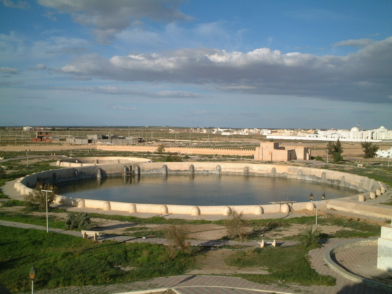 Aghlabid Citerne, Kairouan, Tunisia.